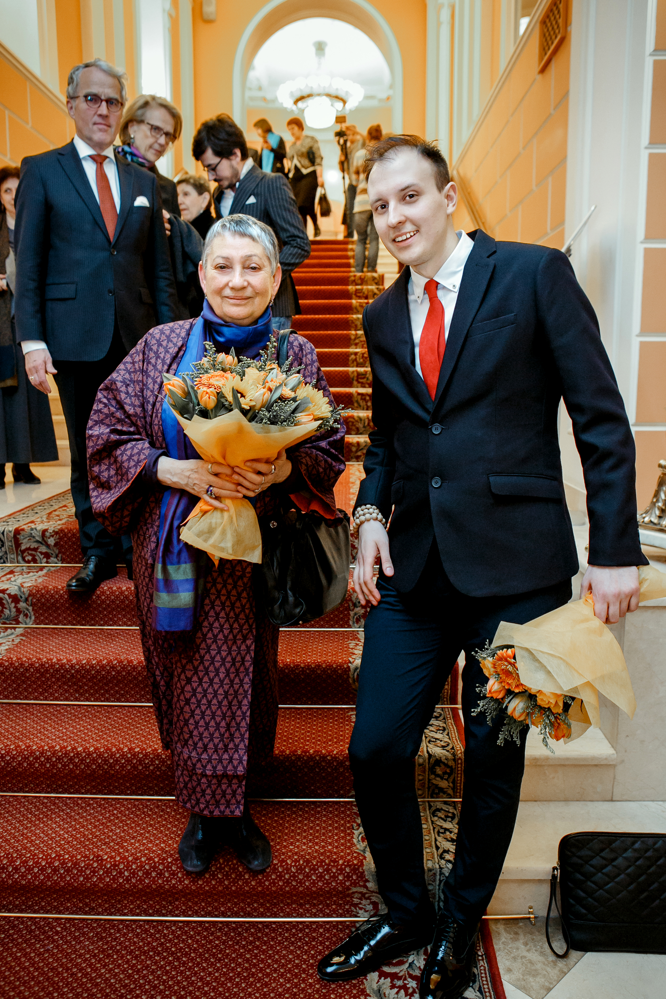 Людмила Улицкая и Алексей Сергунин на премьере оперы "Доктор Гааз" в театре "Геликон-опера", 16 апреля 2016